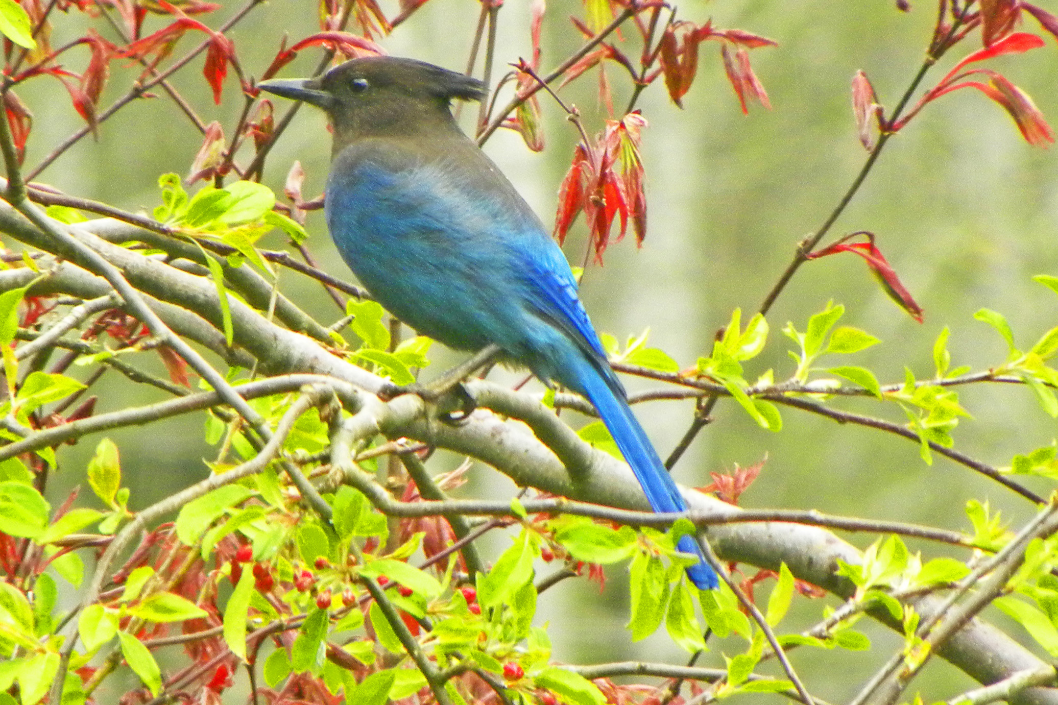 Cyanocitta stelleri